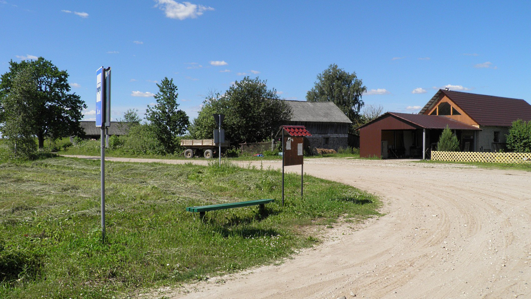 ЗилкалнеLatviešu: Zilkalne (4)